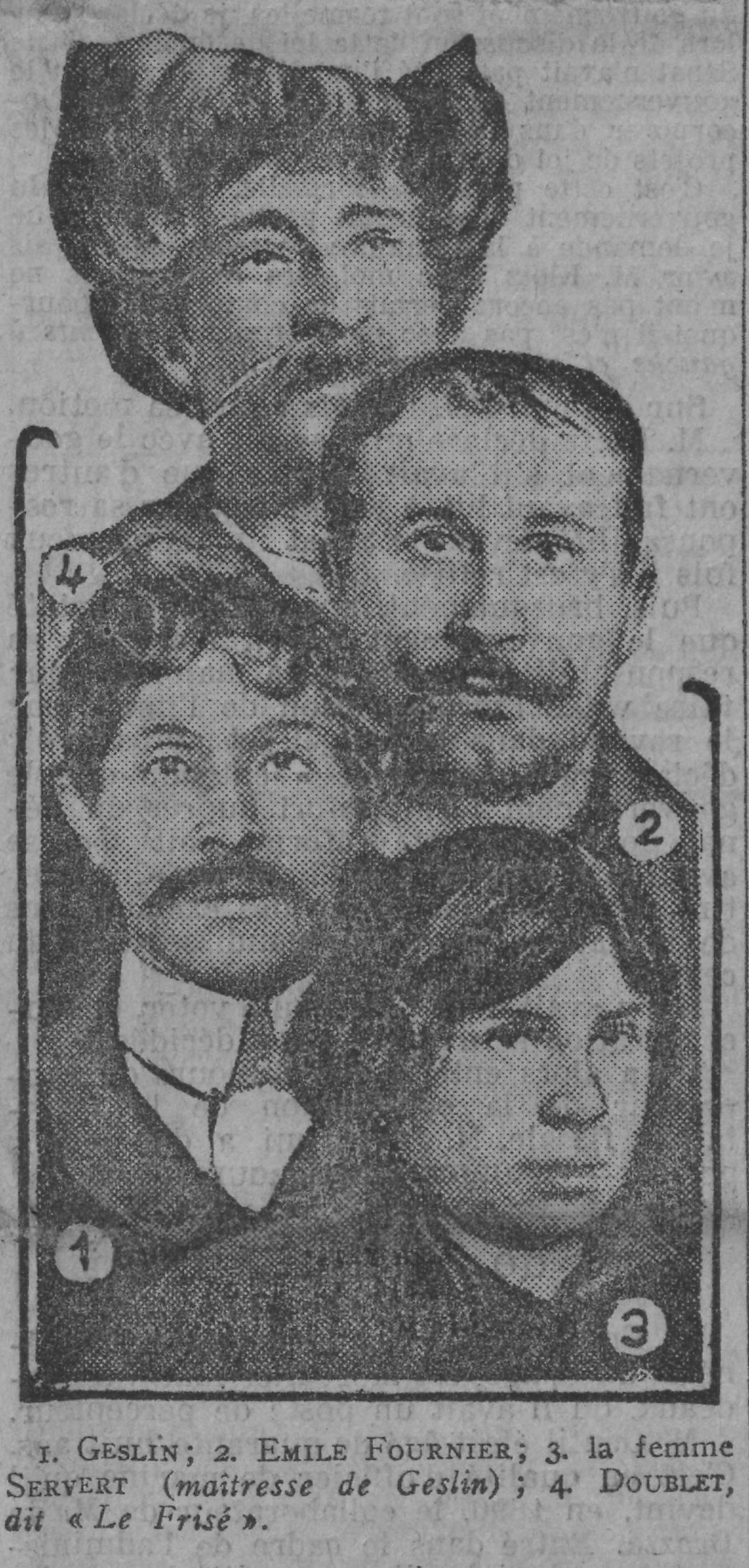 Une du Journal